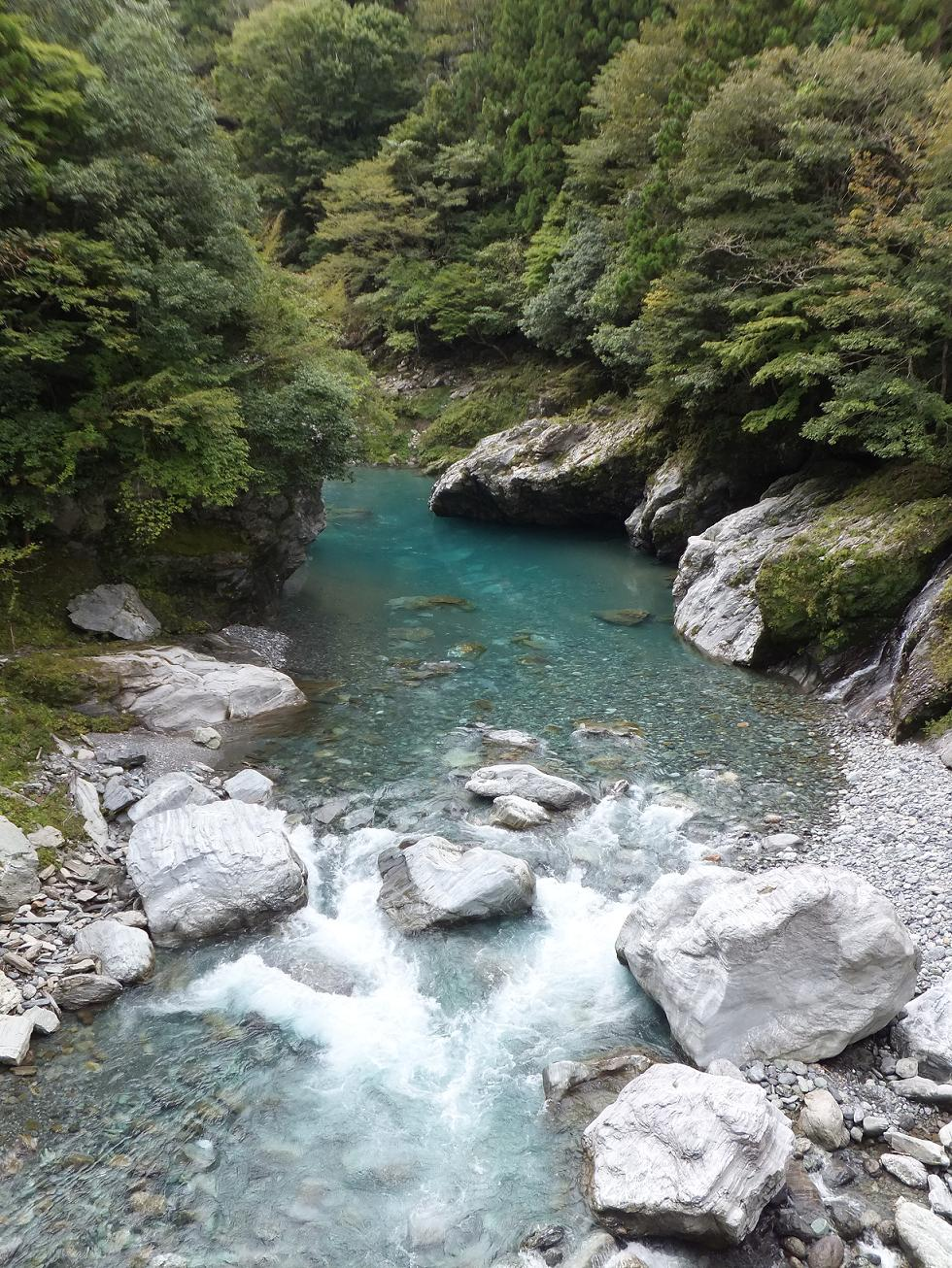 穴吹川（徳島県美馬市木屋平）